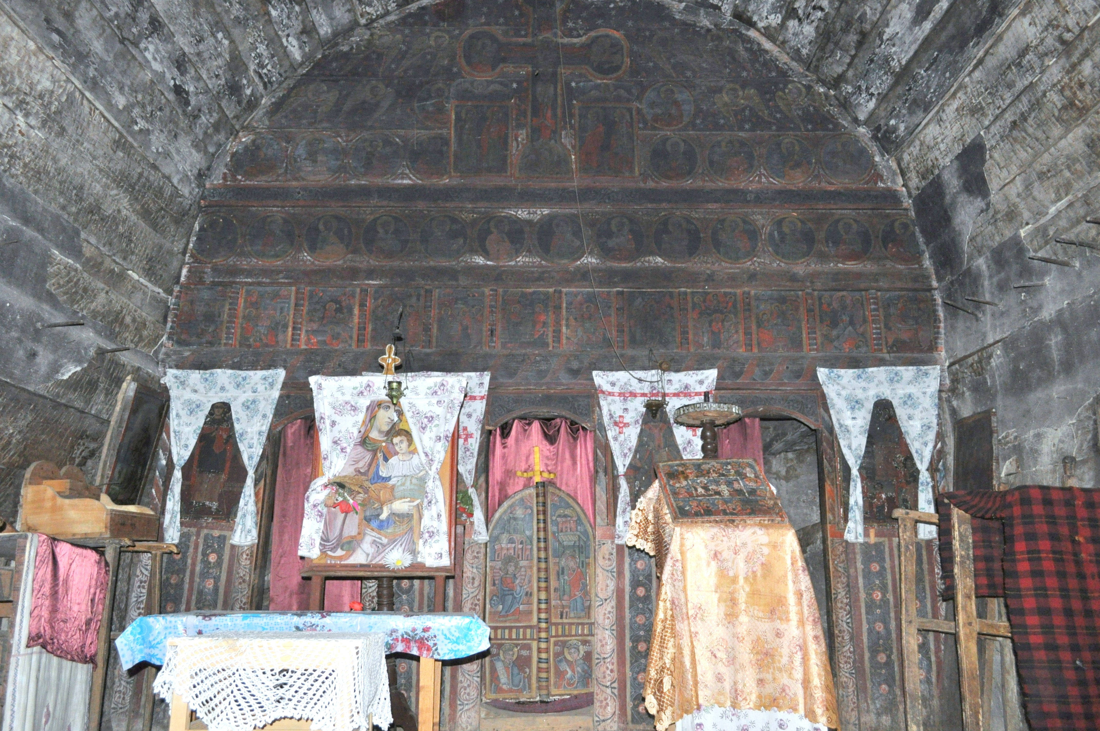 Biserica de lemn „Intrarea în Biserică a Maicii Domnului” din Crasna, județul Gorj